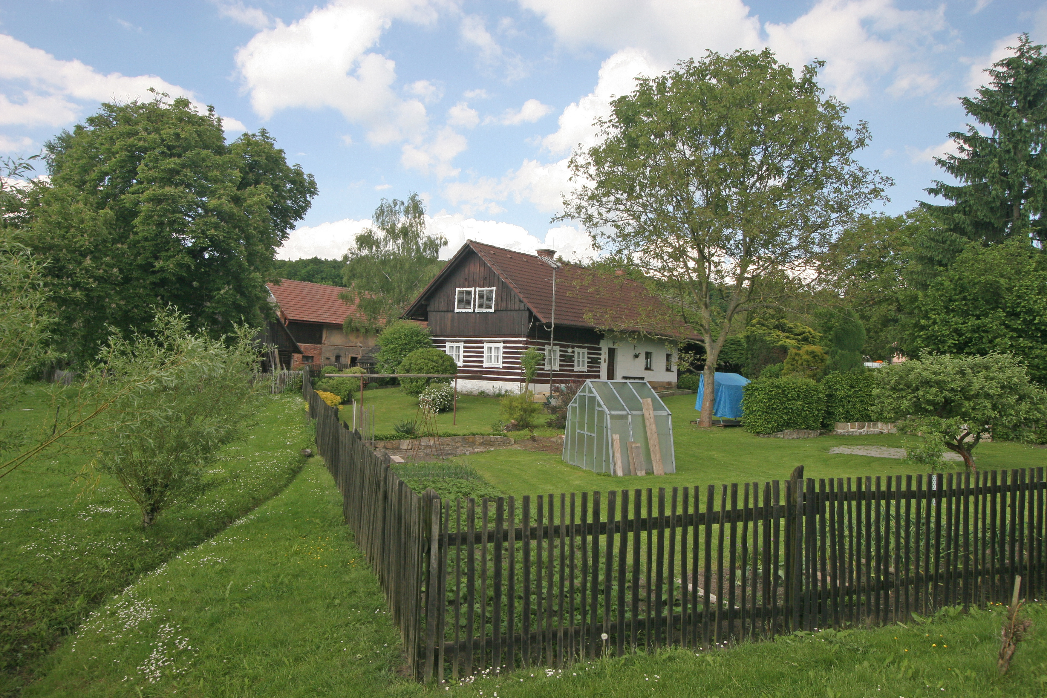 Dobeš čp. 10